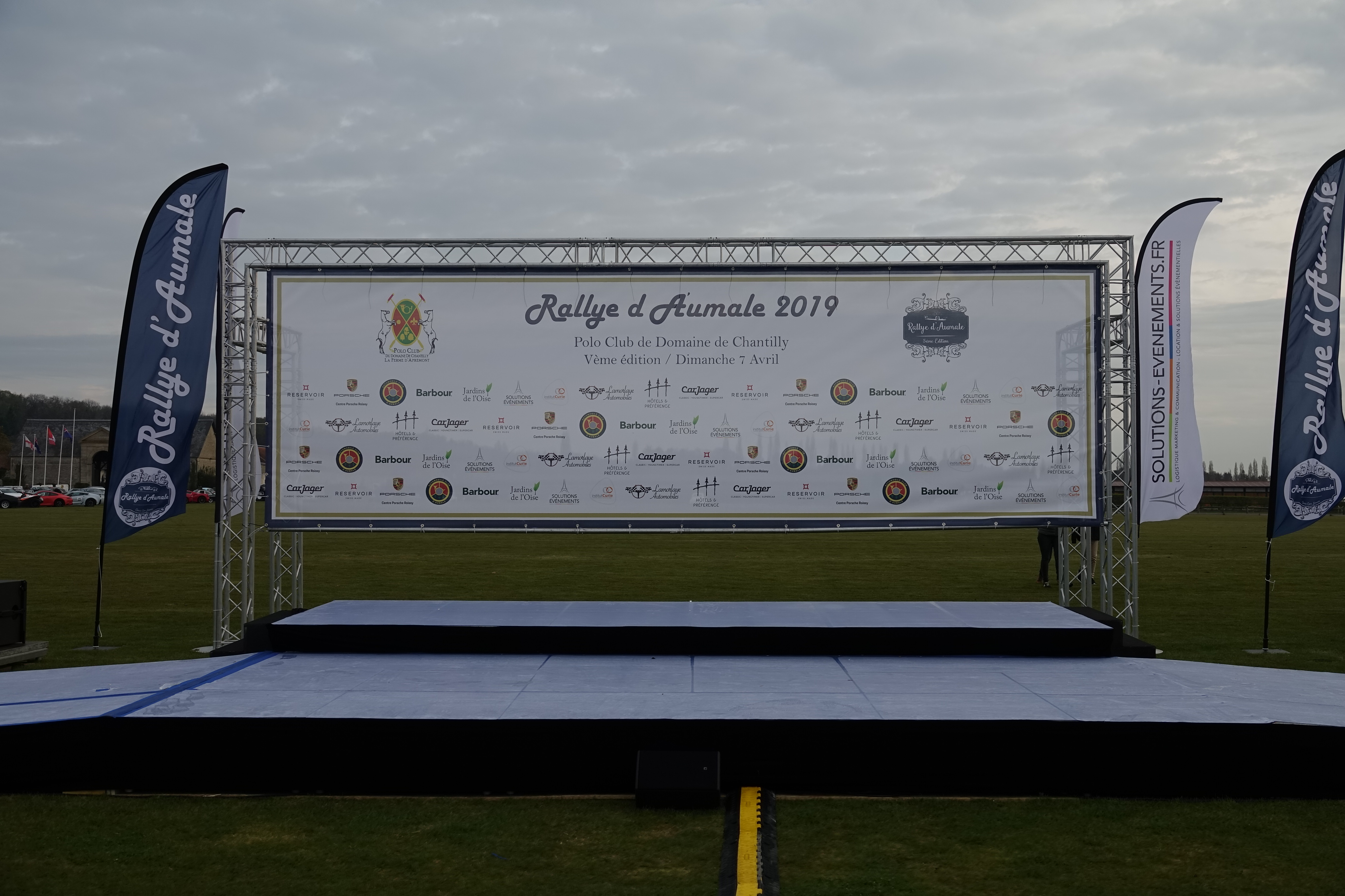 Rallye d'Aumale 2019 à Apremont (60)